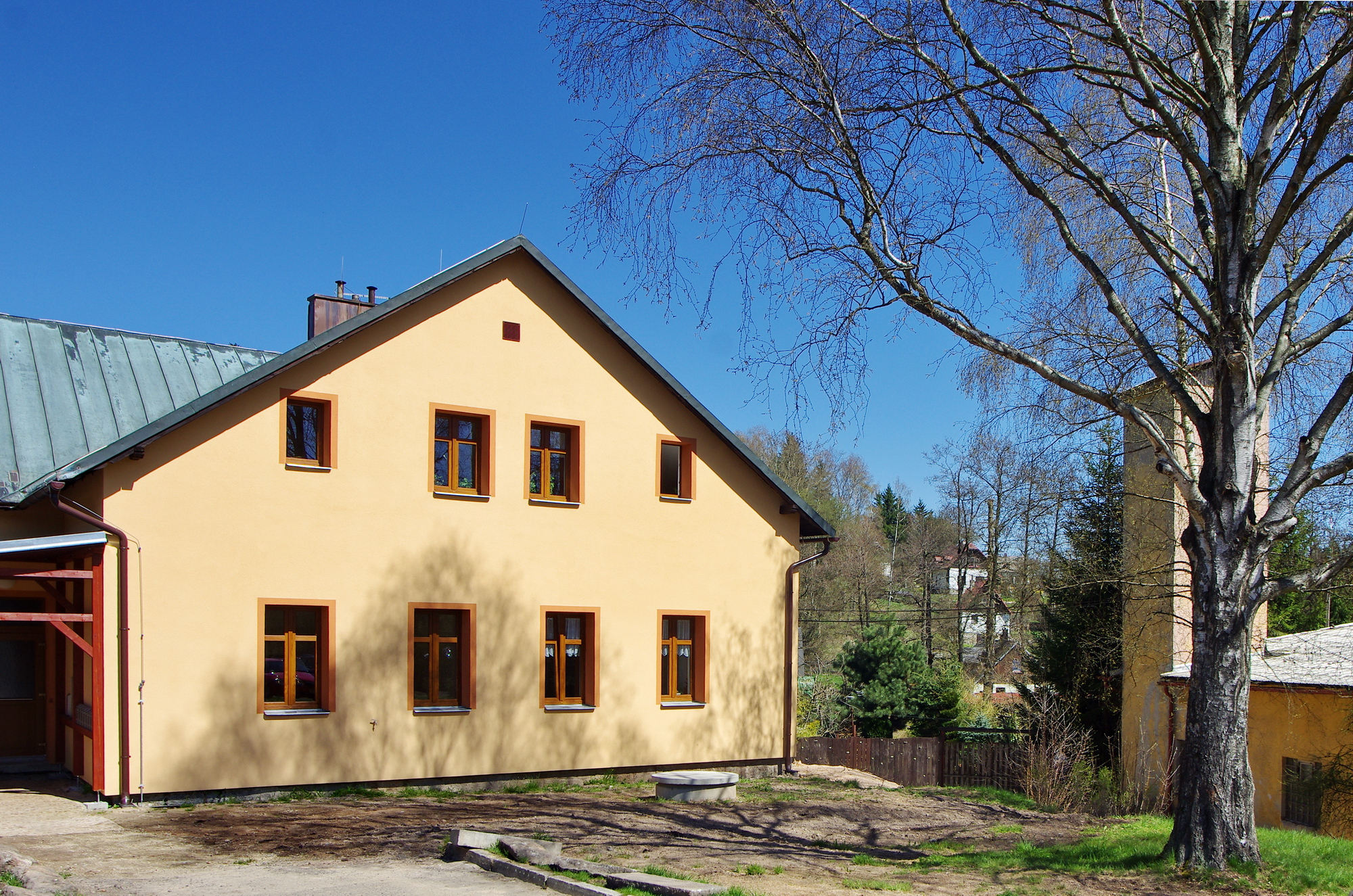 Obec Černava v Krušných horách, okres Karlovy Vary